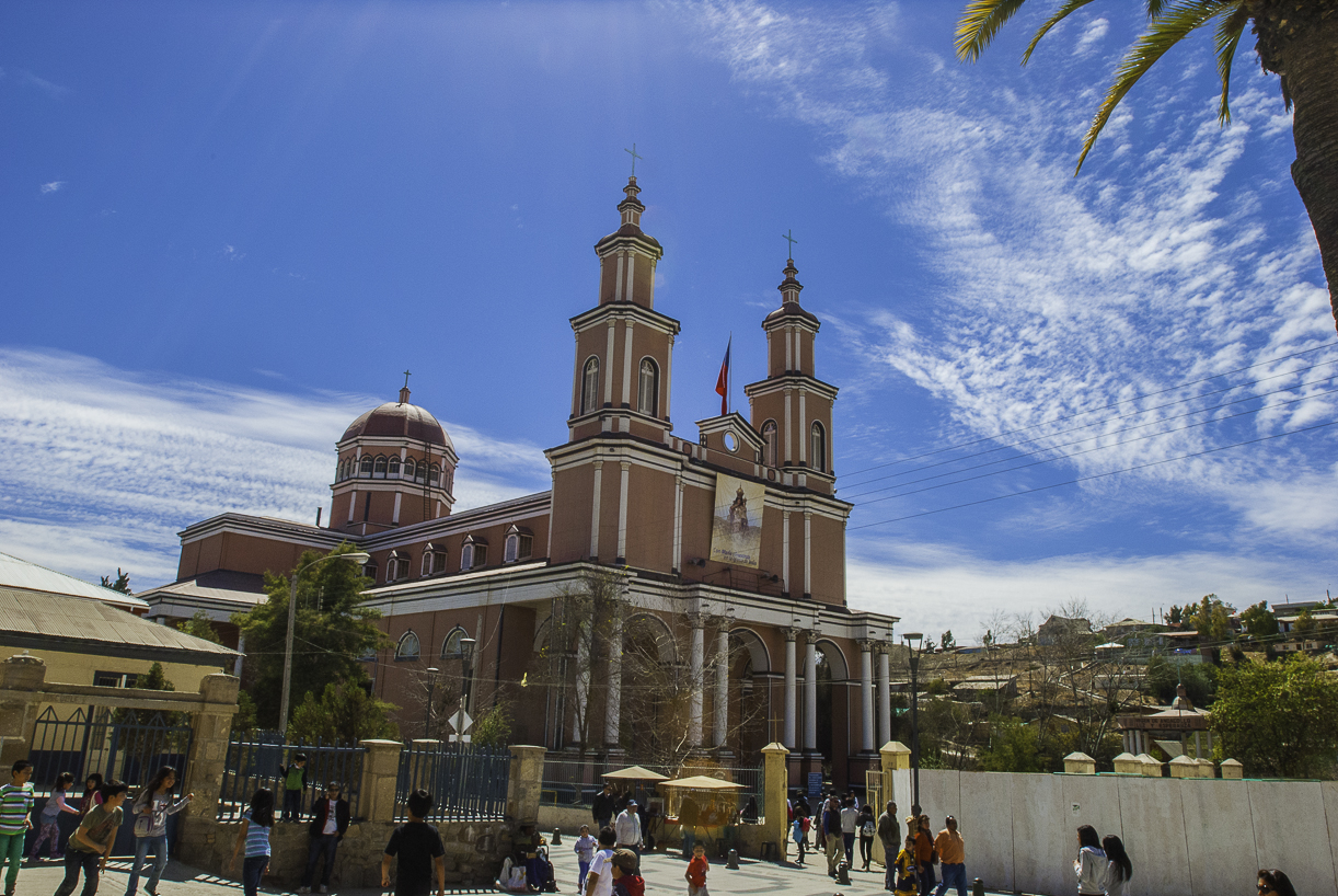 Exterior Iglesia grande de Andacollo This is a photo of a national monument in Chile: 604